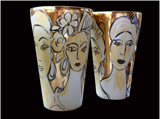 Coleção Ouro